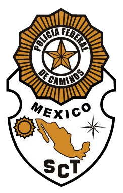 Escudo de la Policía Federal de Caminos, institución que existió en México de 1931 a 1999.